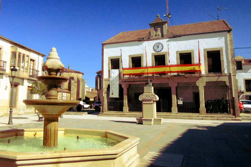 Plaza principal de Bermillo de Sayago con el edificio del Ayuntamiento al fondo